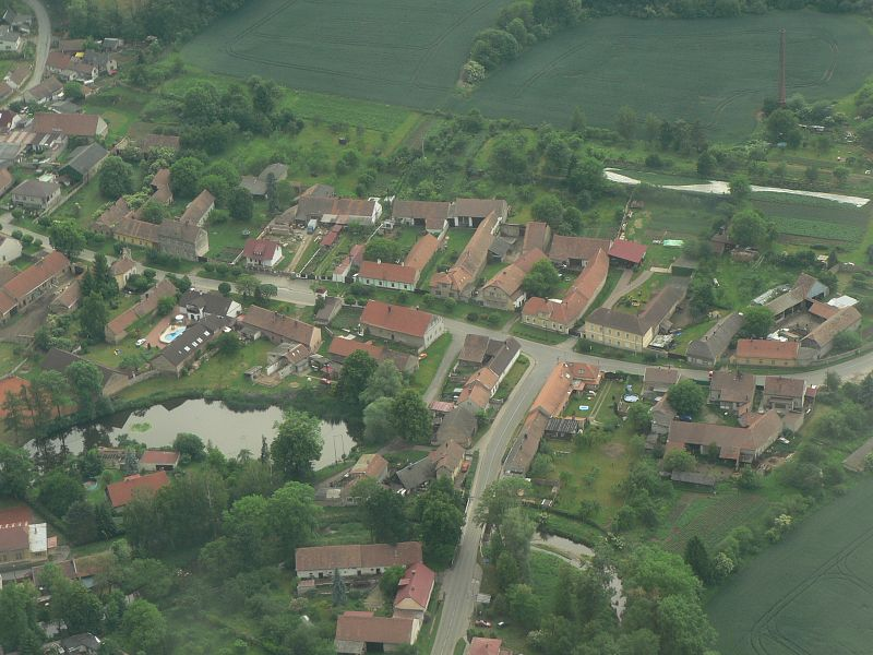 Močovice